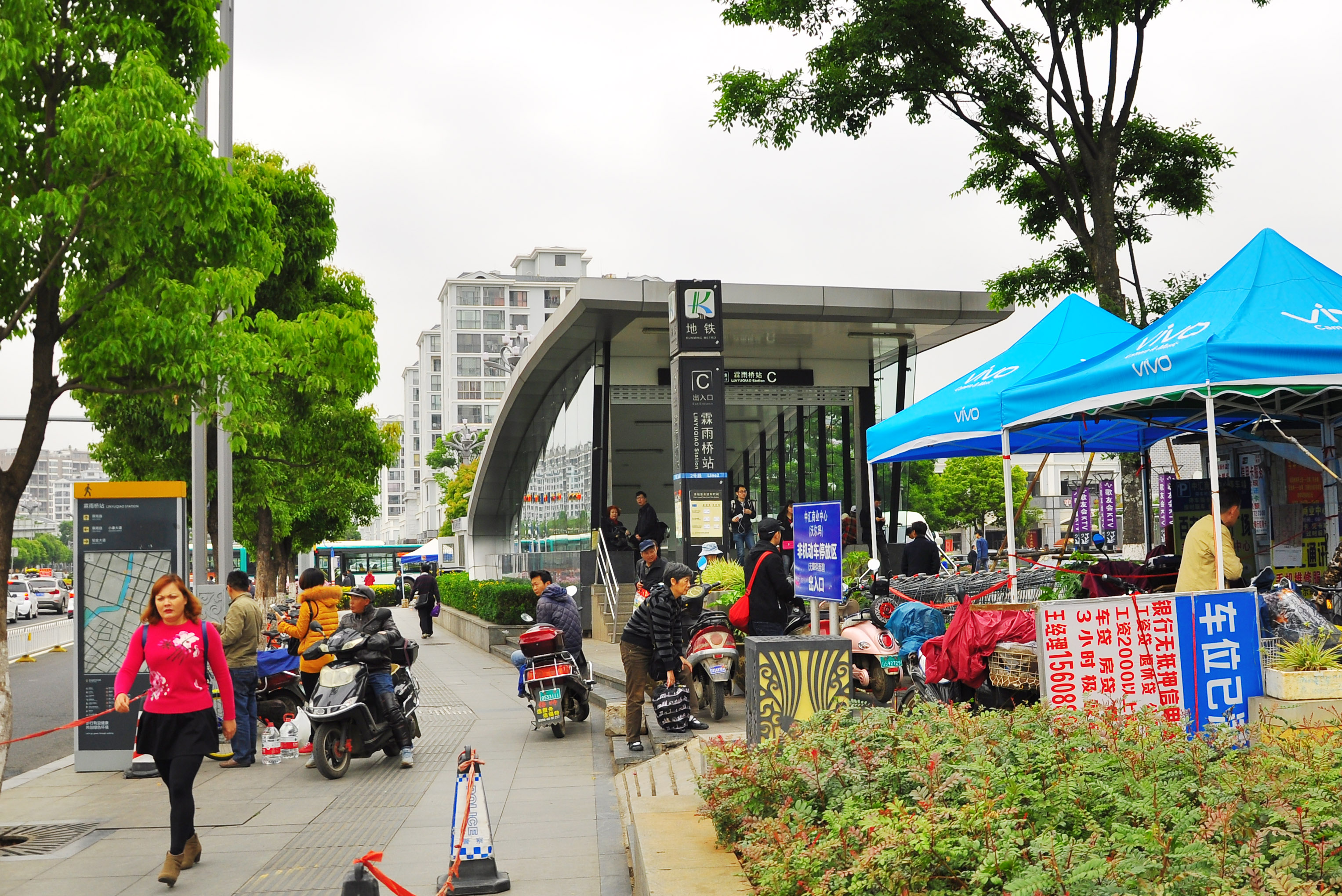 昆明地铁2号线霖雨桥站。